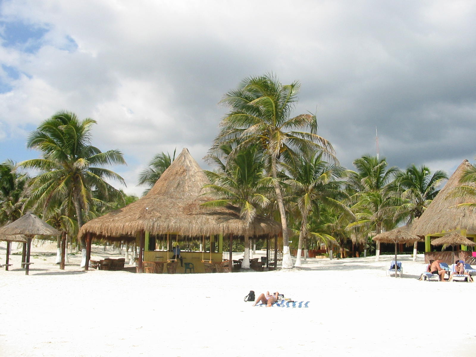 mexico yucatan